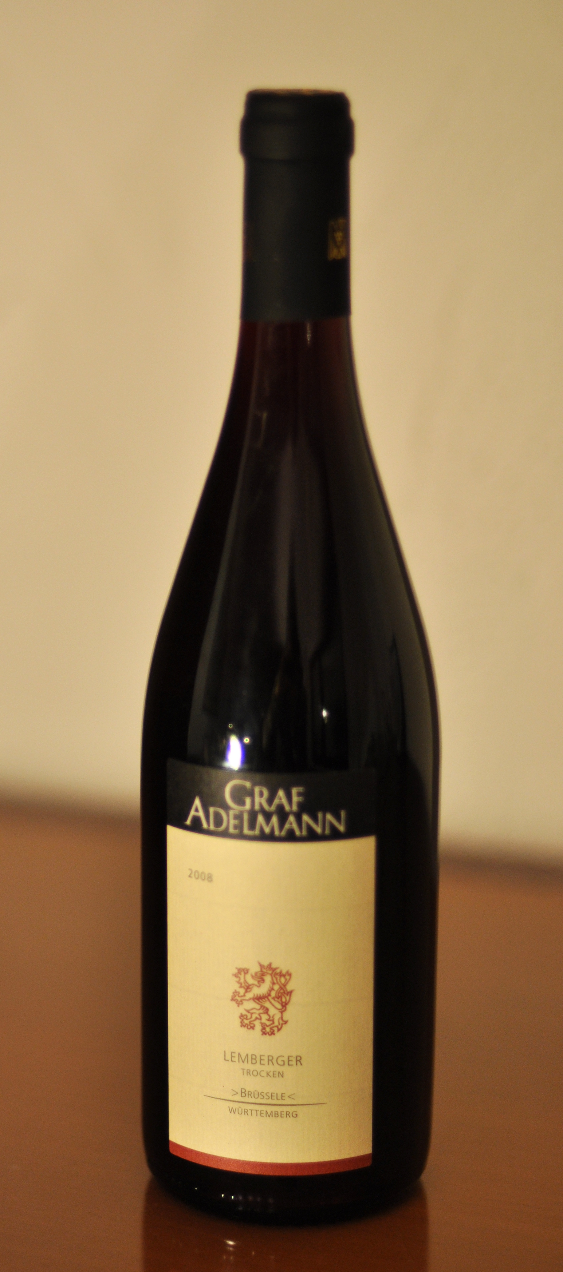 Bottle of Wine, Lemberger 2008 Brüssele, Weingut Graf Adelmann, Württemberg, Germany